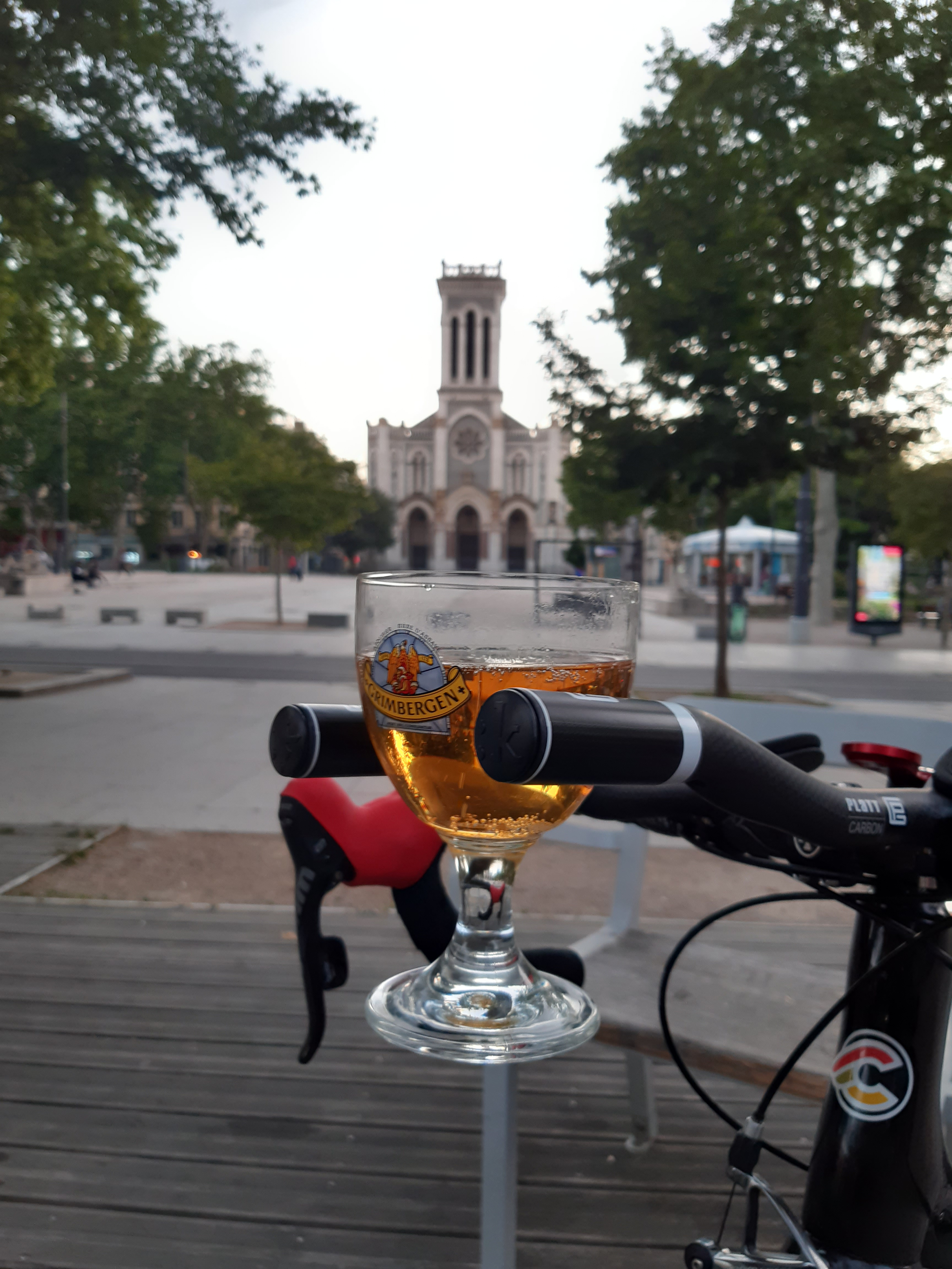 Place Jean Jaurès - Saint Etienne - Bière